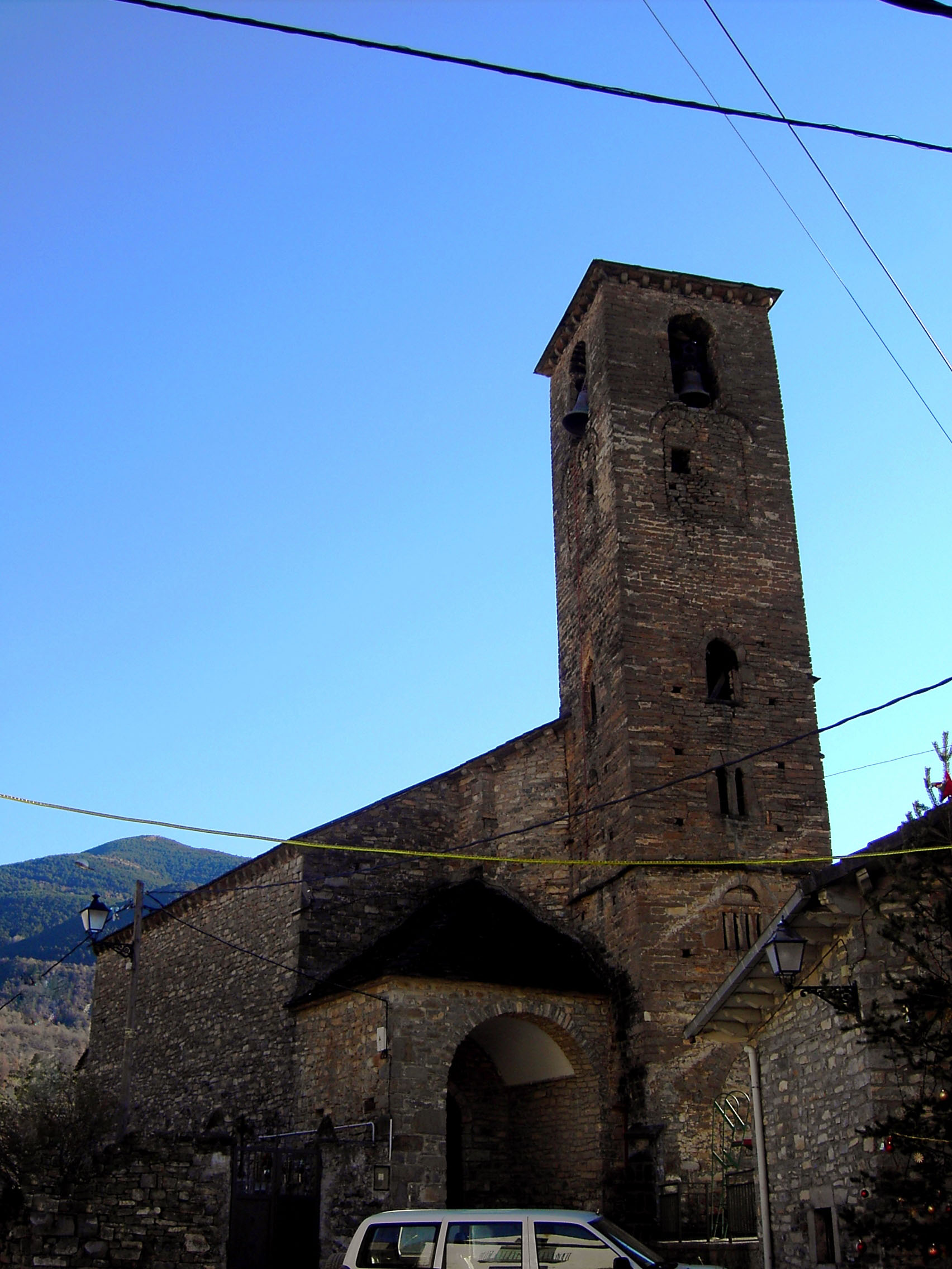 La iglesia de Oto, dedicada a San Saturnino, es una obra original del siglo XI emparentada con las iglesias del vecino Sarrablo, aunque con añadidos posteriores en los siglos XVI y XVII.